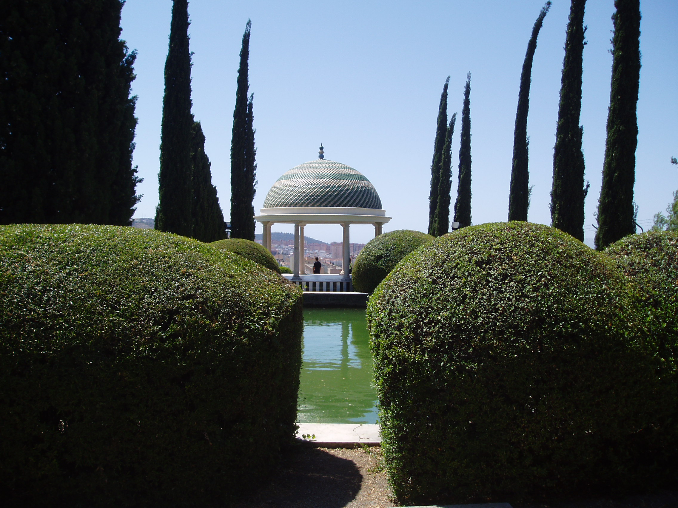 Jardín Botánico Histórico de La Concepción. Málaga, España.